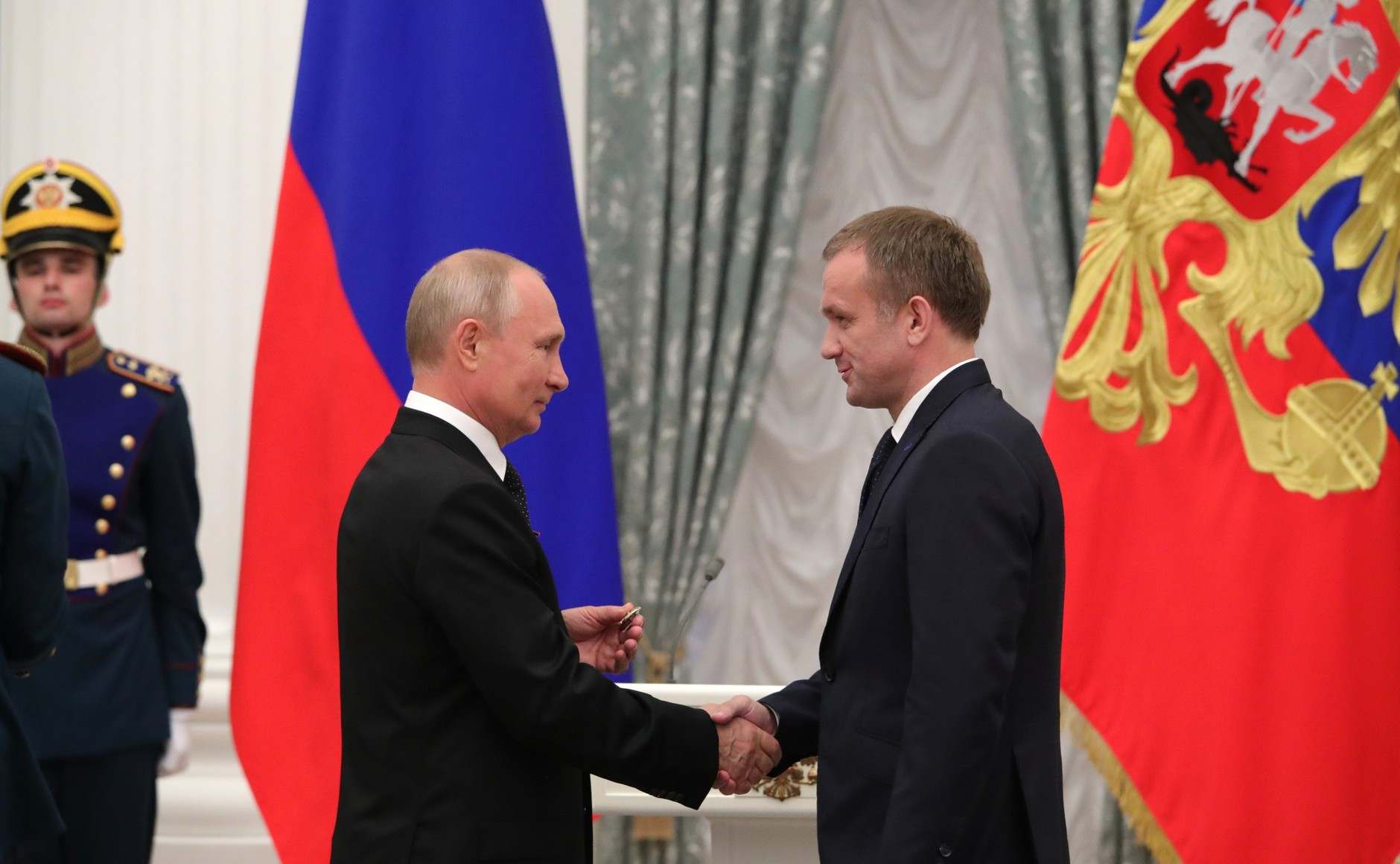 Вручение Государственных премий Российской Федерации. С главным врачом Городской клинической больницы № 15 имени О.М.Филатова Департамента здравоохранения города Москвы Валерием Вечорко.